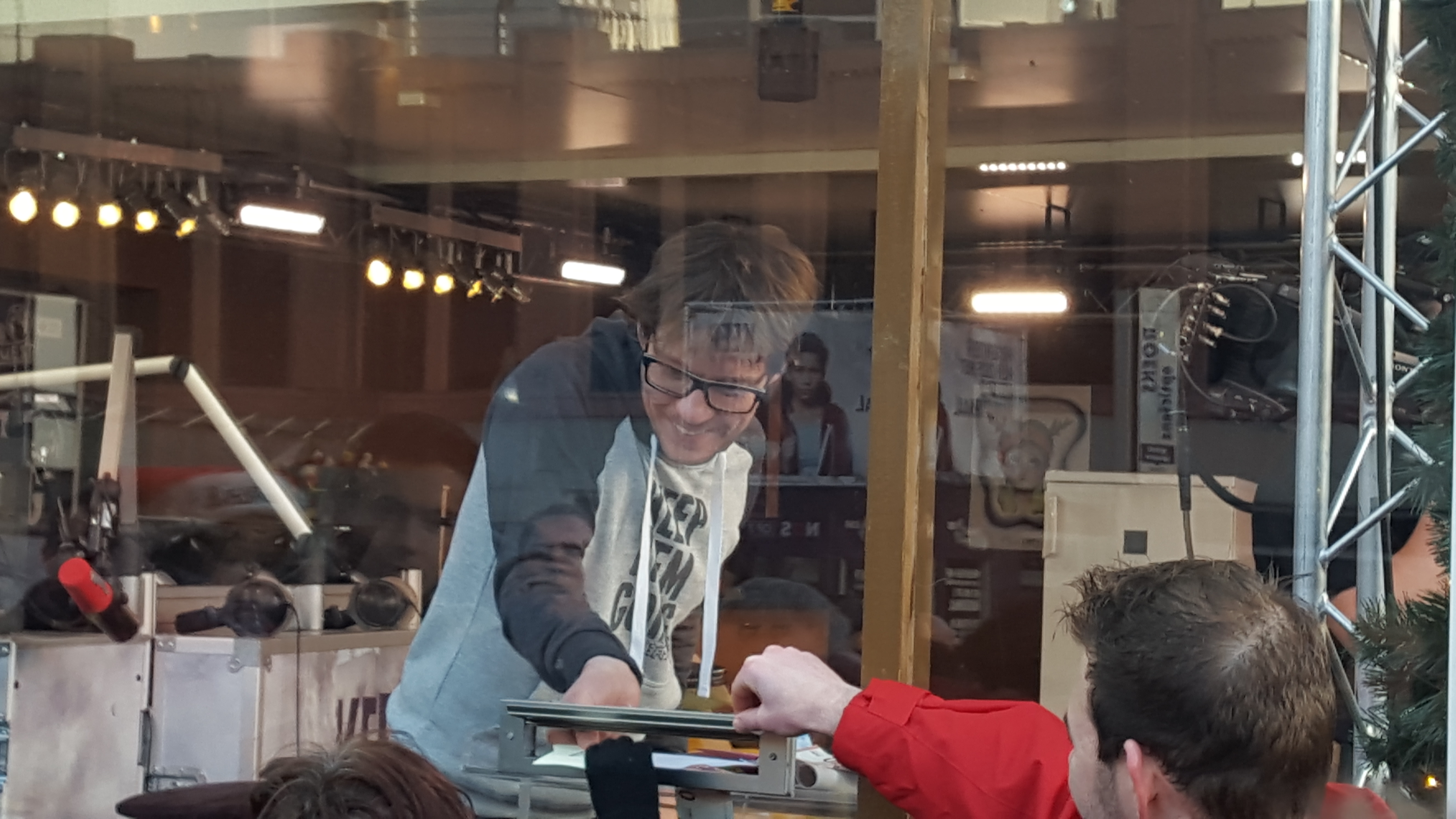 Het Glazen Huis in Heerlen, Serious Request 2015